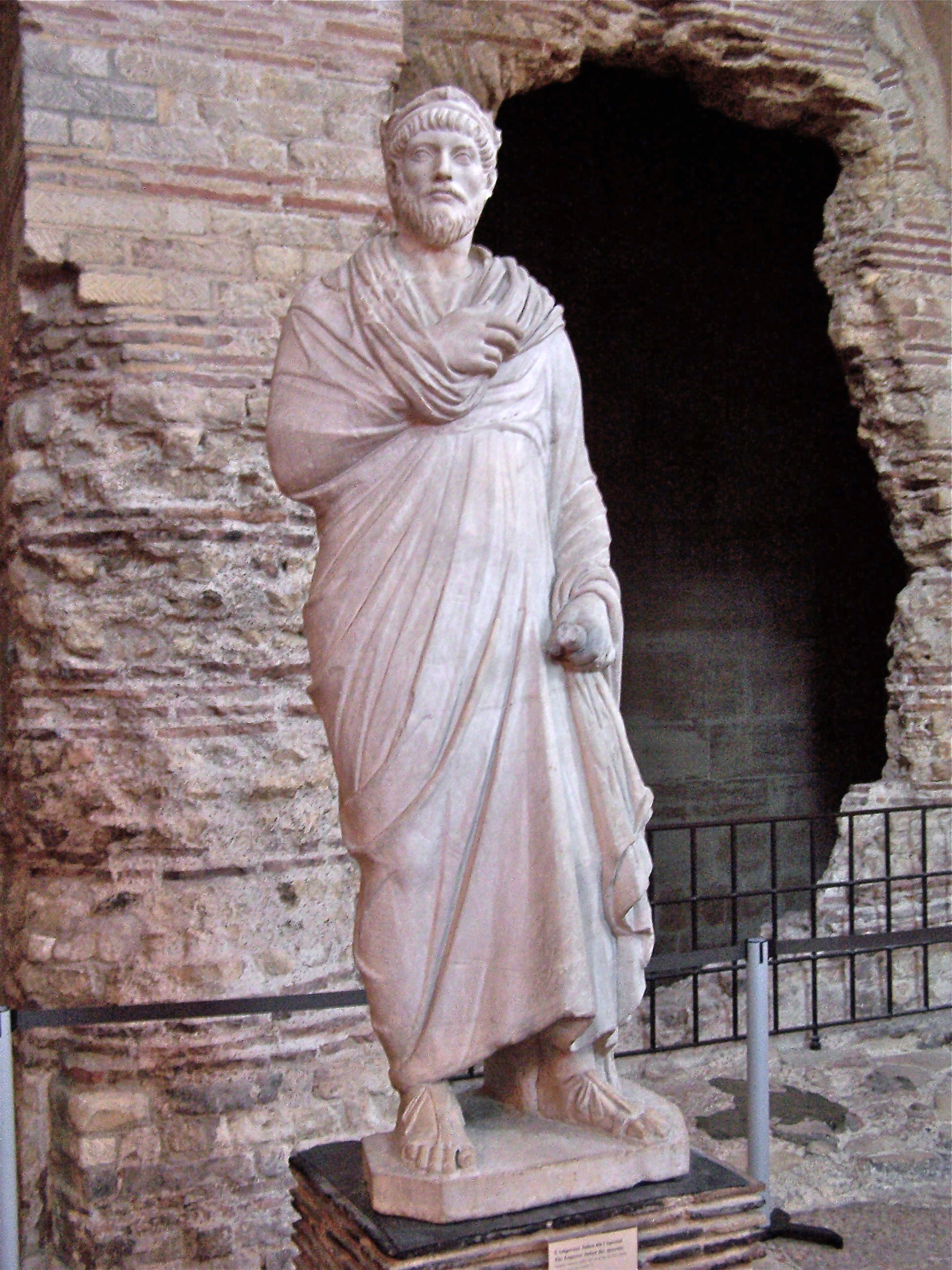 Prêtre de Sérapis, marbre de Naxos, réalisée en Italie entre 361-400, rapporté en France en 1787, collection du Musée de Cluny depuis 1859, fut longtemps nommée Julien l’apostat. [1]